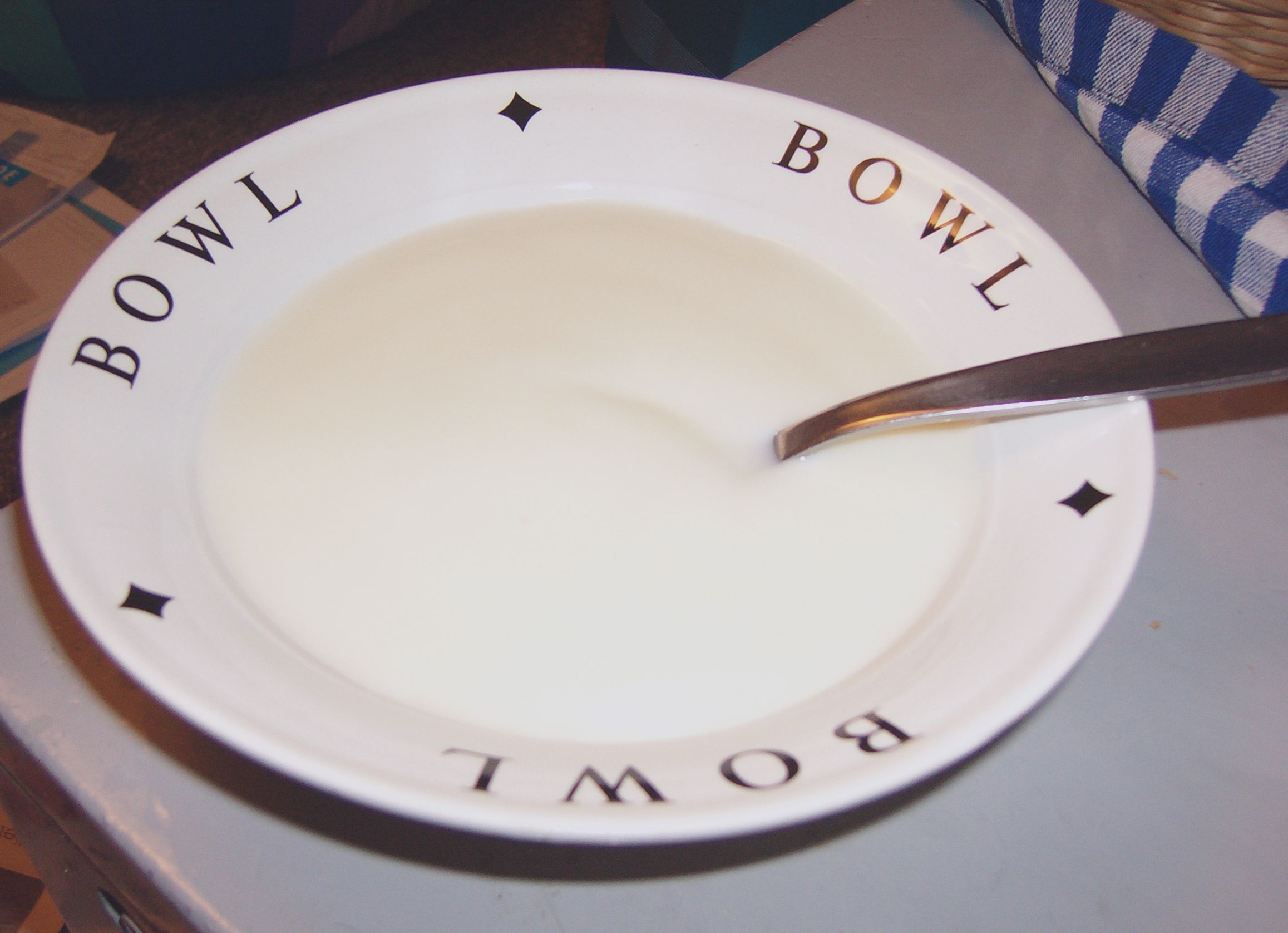 Blanke vla. Eigen werk.